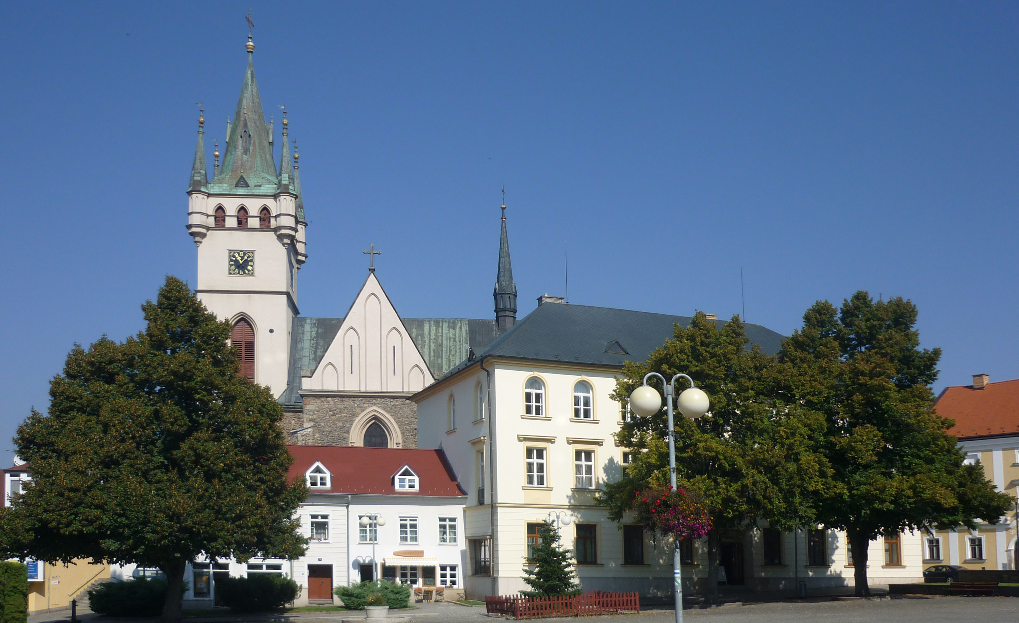 Obermarkt in Humpolec (Horní náměstí)